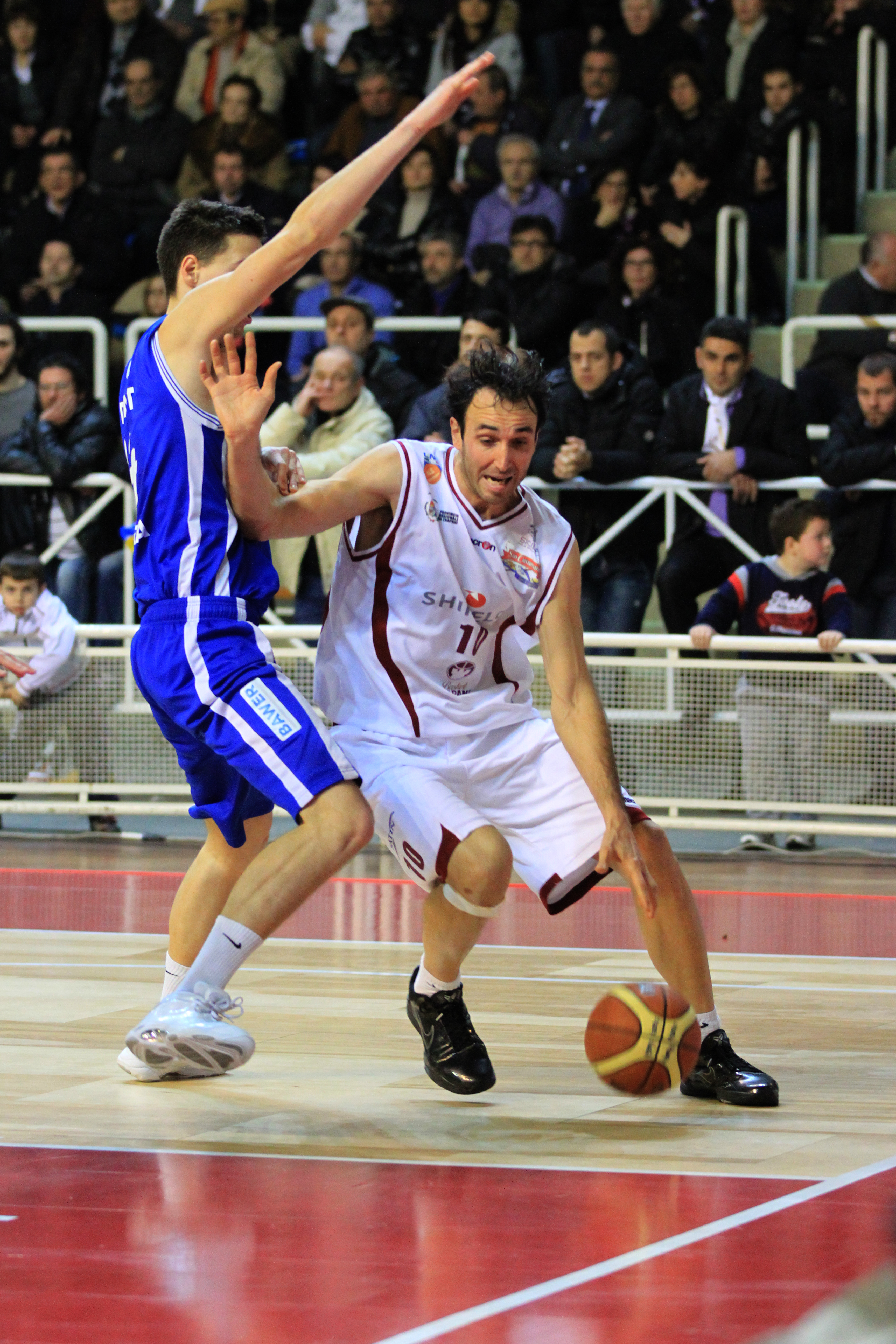 Walter Santarossa in Azione